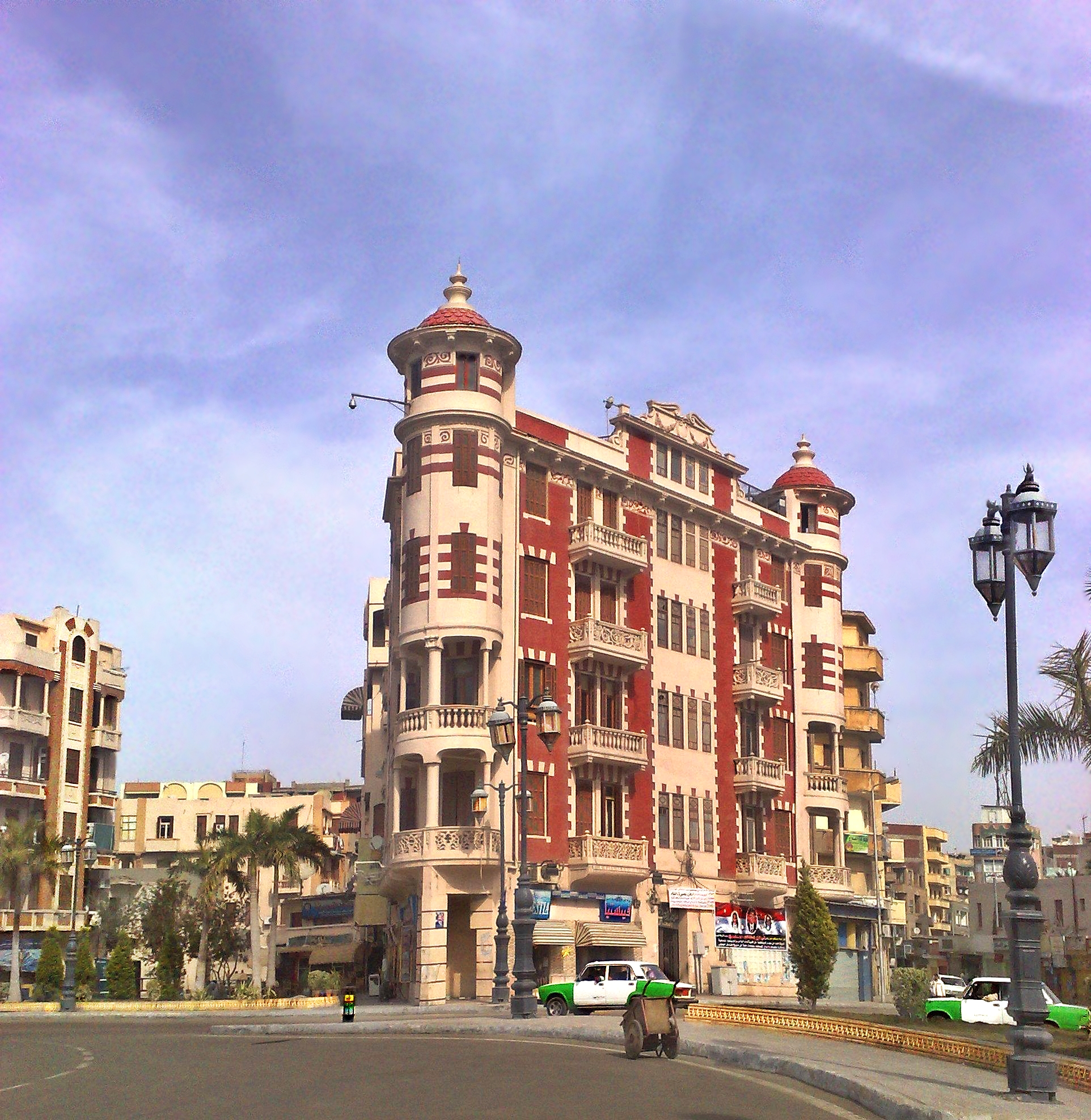 العمارة بدمنهور